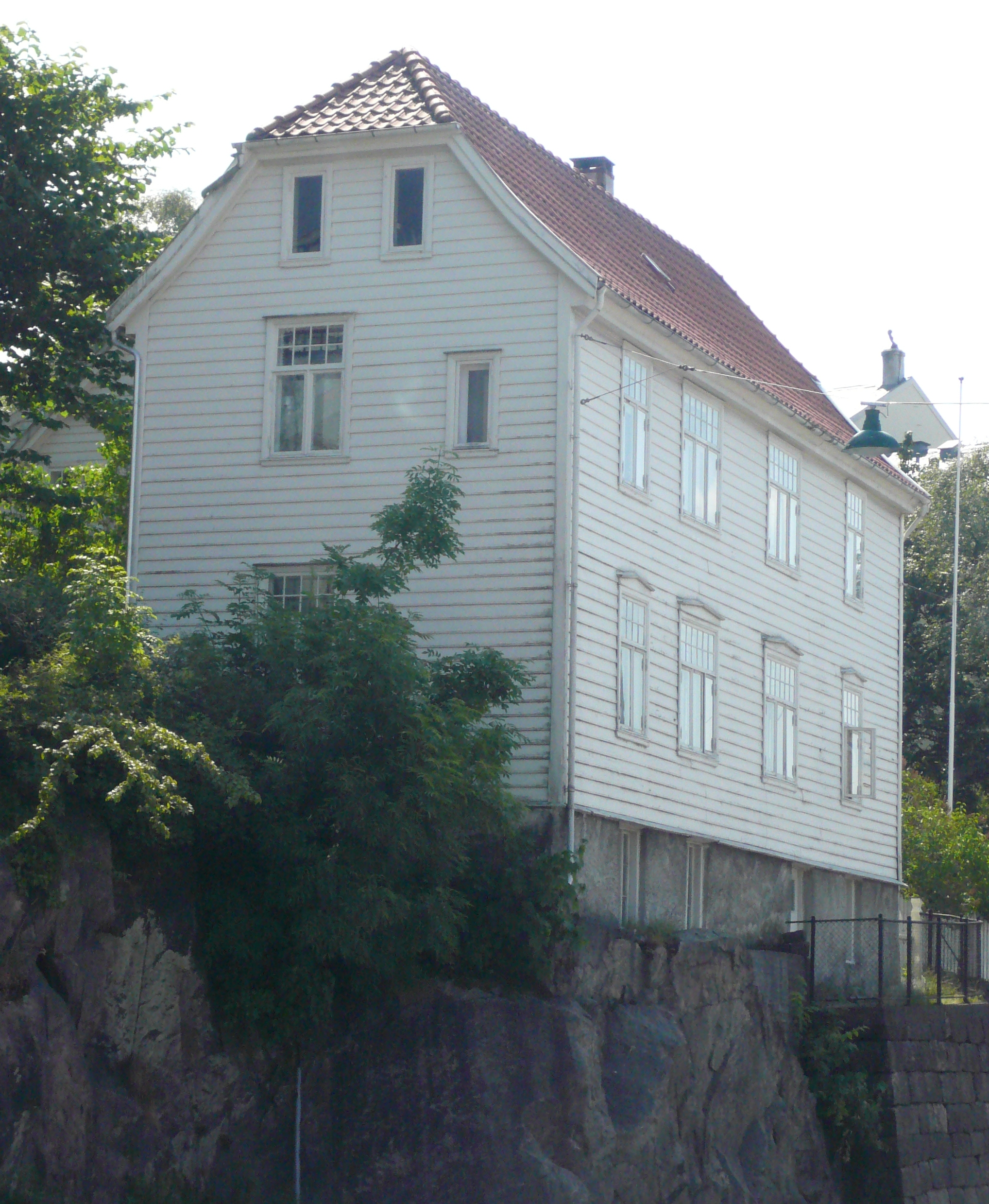 Møllersalen, Bergen, Norway